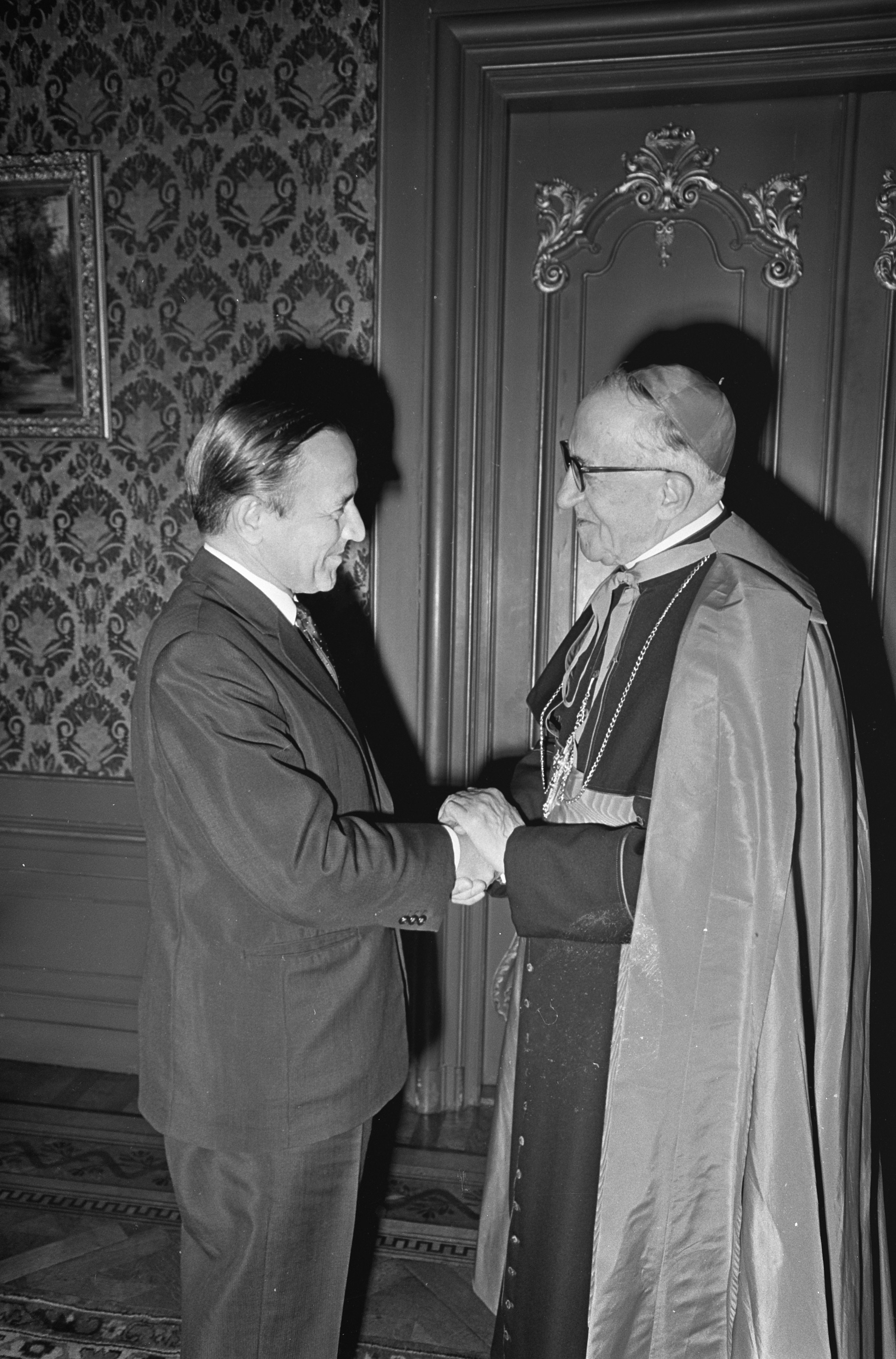 Collectie / Archief : Fotocollectie Anefo Reportage / Serie : Afscheid van mgr. Beltrami Beschrijving : Minister-president de Jong (links) en mgr. Beltrami Annotatie : Mgr. Guiseppe Beltrami was pauselijk internuntius in Nederland van 1959 tot 1967 Datum : 13 juni 1967 Trefwoorden : diplomaten, internationale betrekkingen, katholicisme, ministers-presidenten, premiers Persoonsnaam : Beltrami, G., Jong, Piet de Fotograaf : Fotograaf Onbekend / Anefo Auteursrechthebbende : Nationaal Archief Materiaalsoort : Negatief (zwart/wit) Nummer archiefinventaris : bekijk toegang 2.24.01.05 Bestanddeelnummer : 920-4066